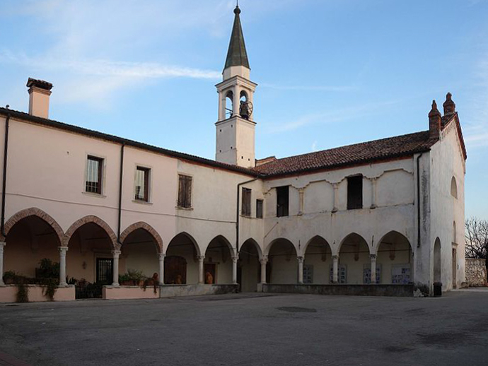 Chiesa di Santa Maria Maddalena di pomeriggio